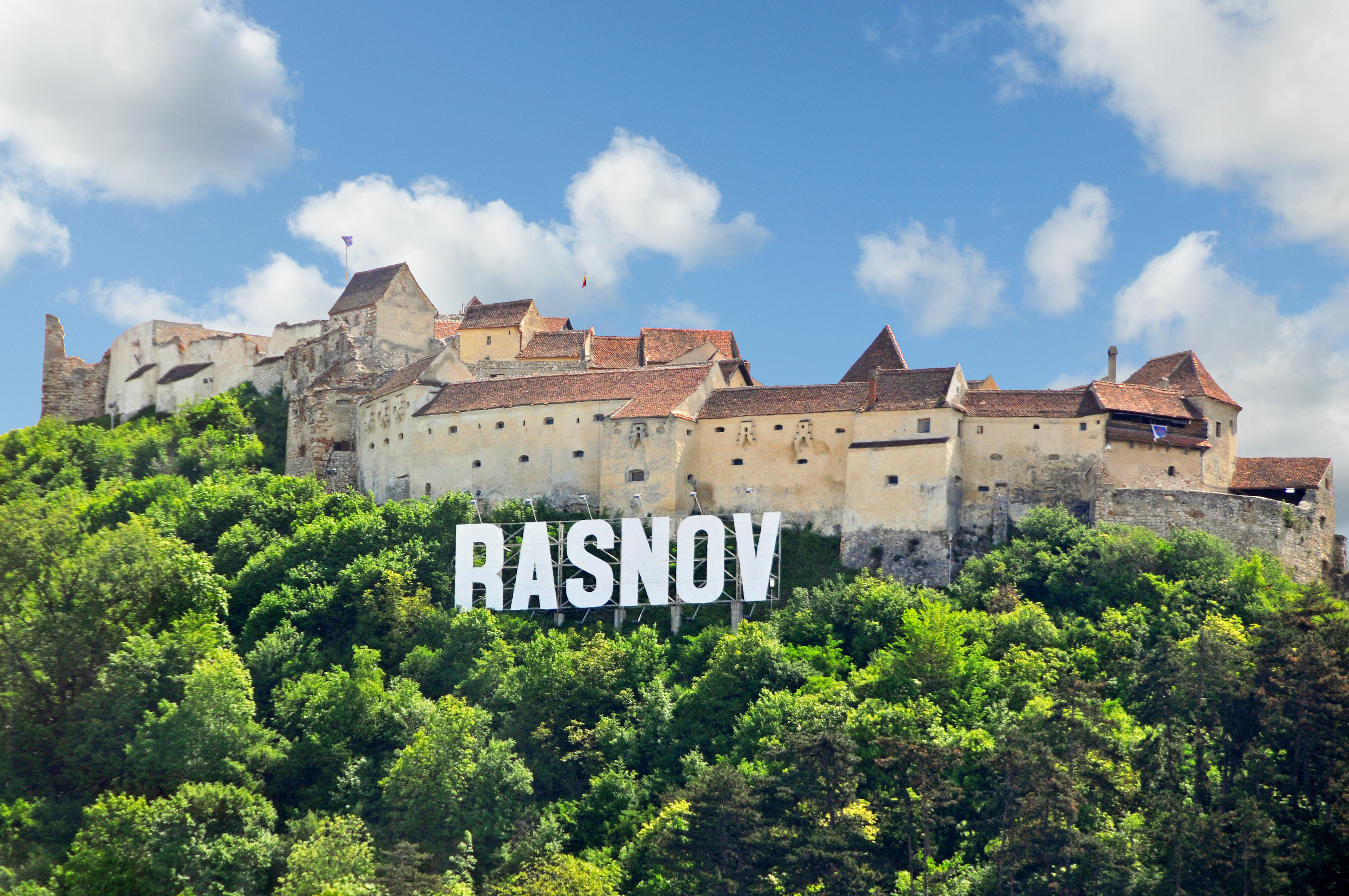 Râșnov citadel